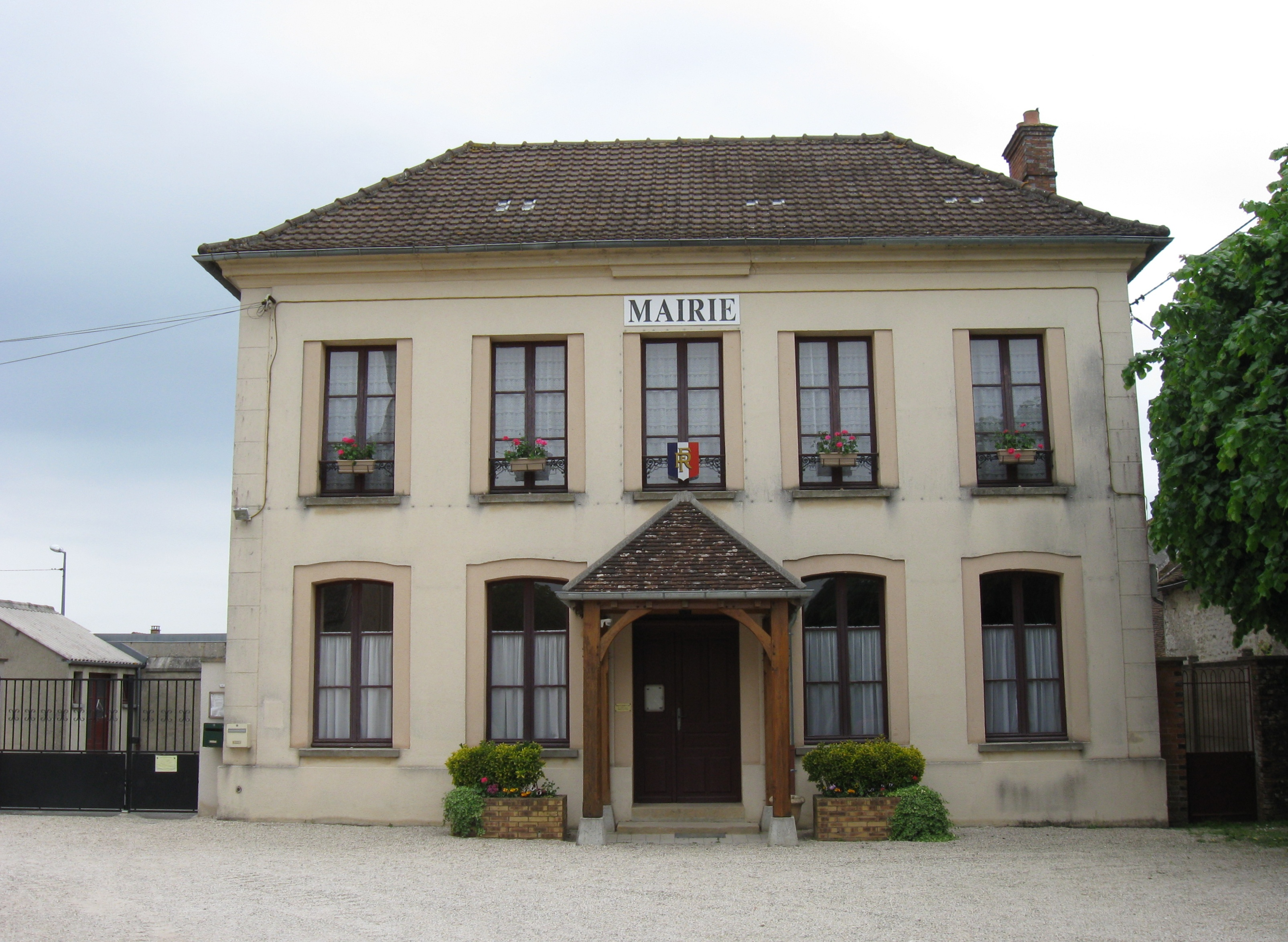 Mairie de Luisetaines. (Seine-et-Marne, région Île-de-France).